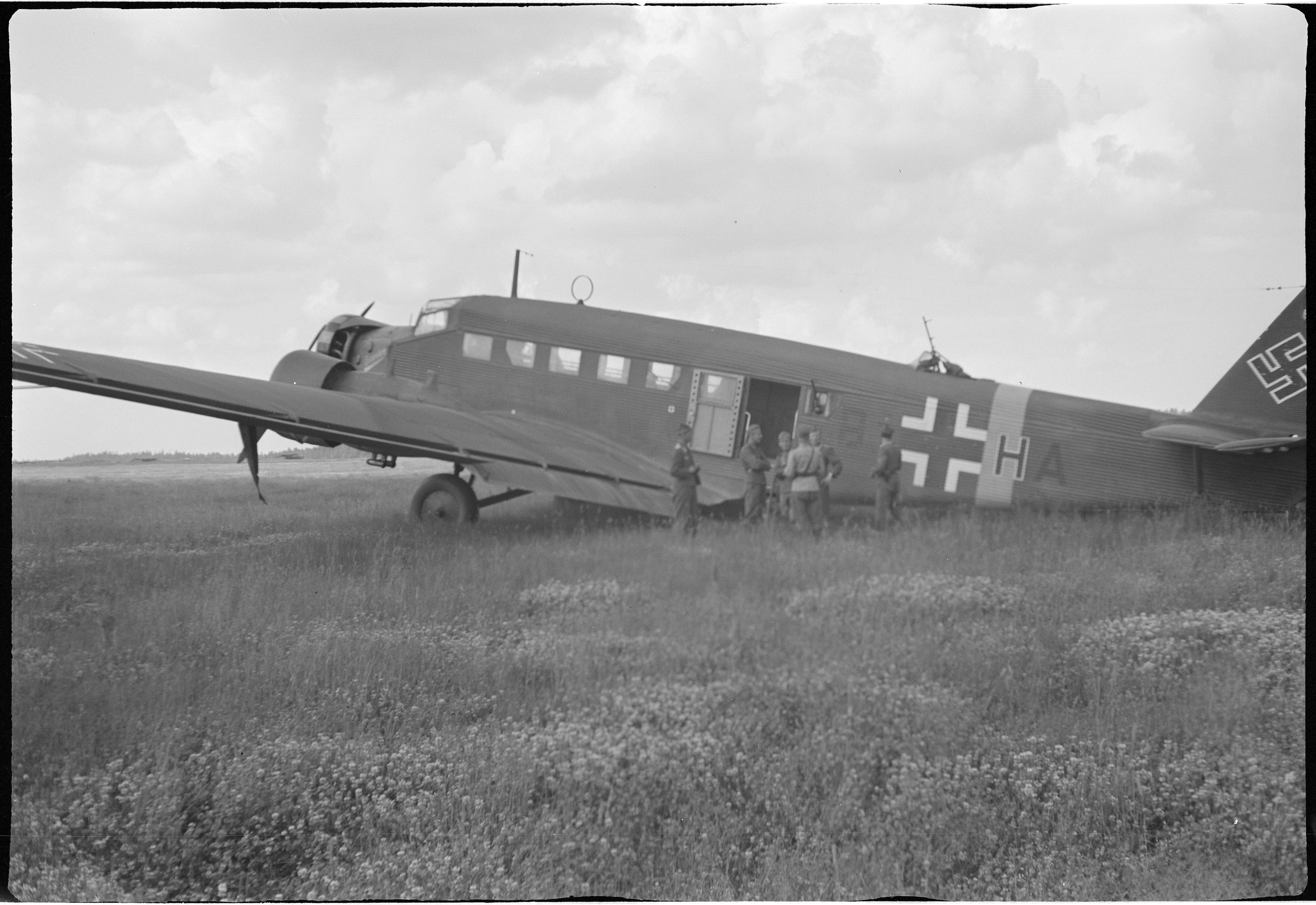 Hannelore on laskeutunut. Kuljetuskoneen siipien väli on 30 metriä ja se kuljettaa 30 henkilöä. (Kuvassa on Junkers Ju 52 (tunnus B1+HA)). Kuvauspaikka: Käkisalmi